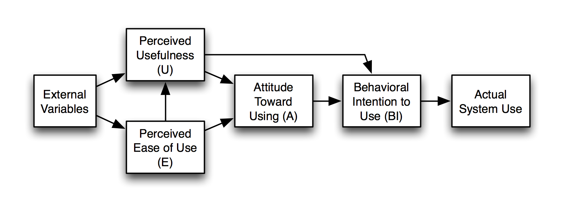 Aufbau des Technology Acceptance Models